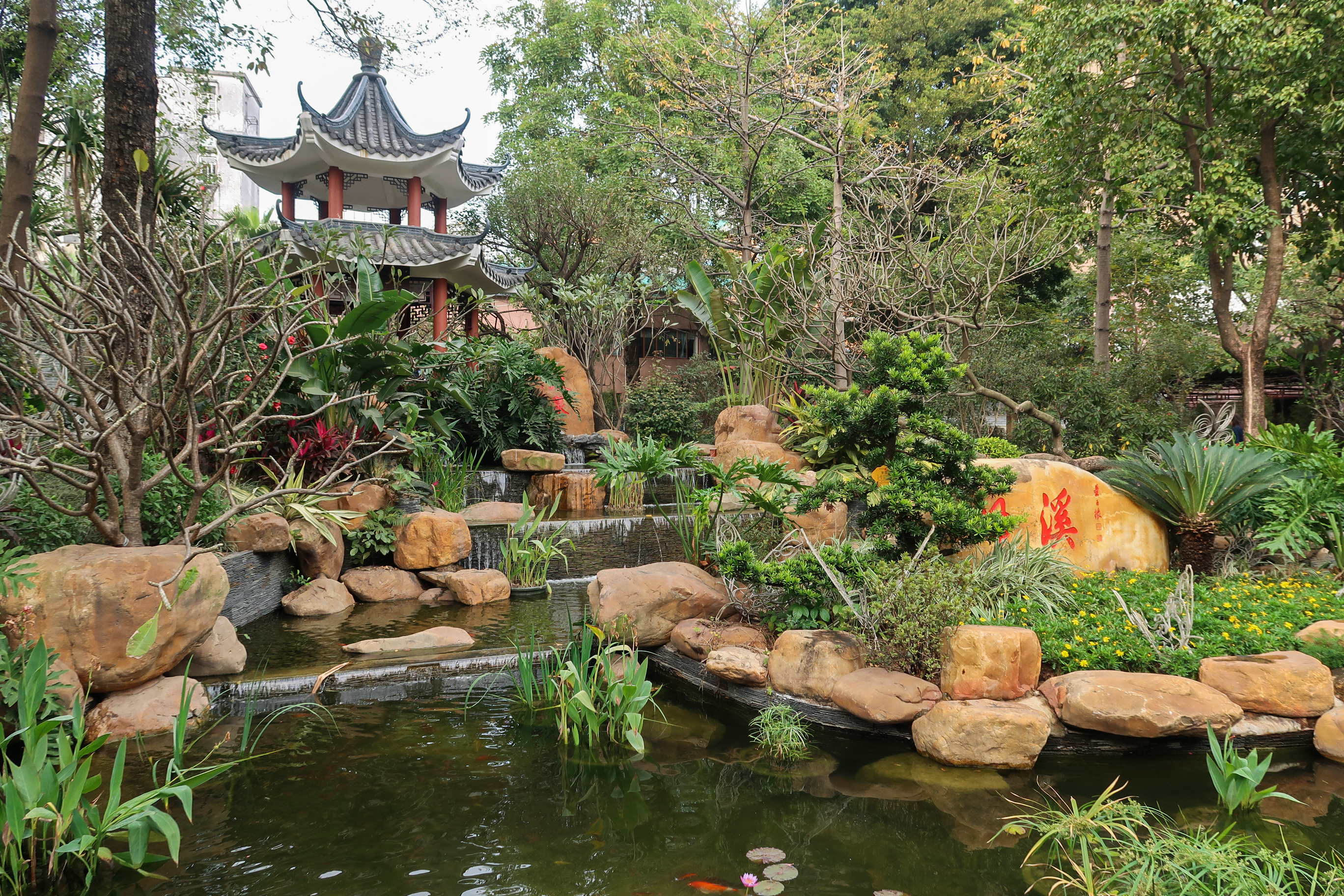 Guangzhou Cultural Park